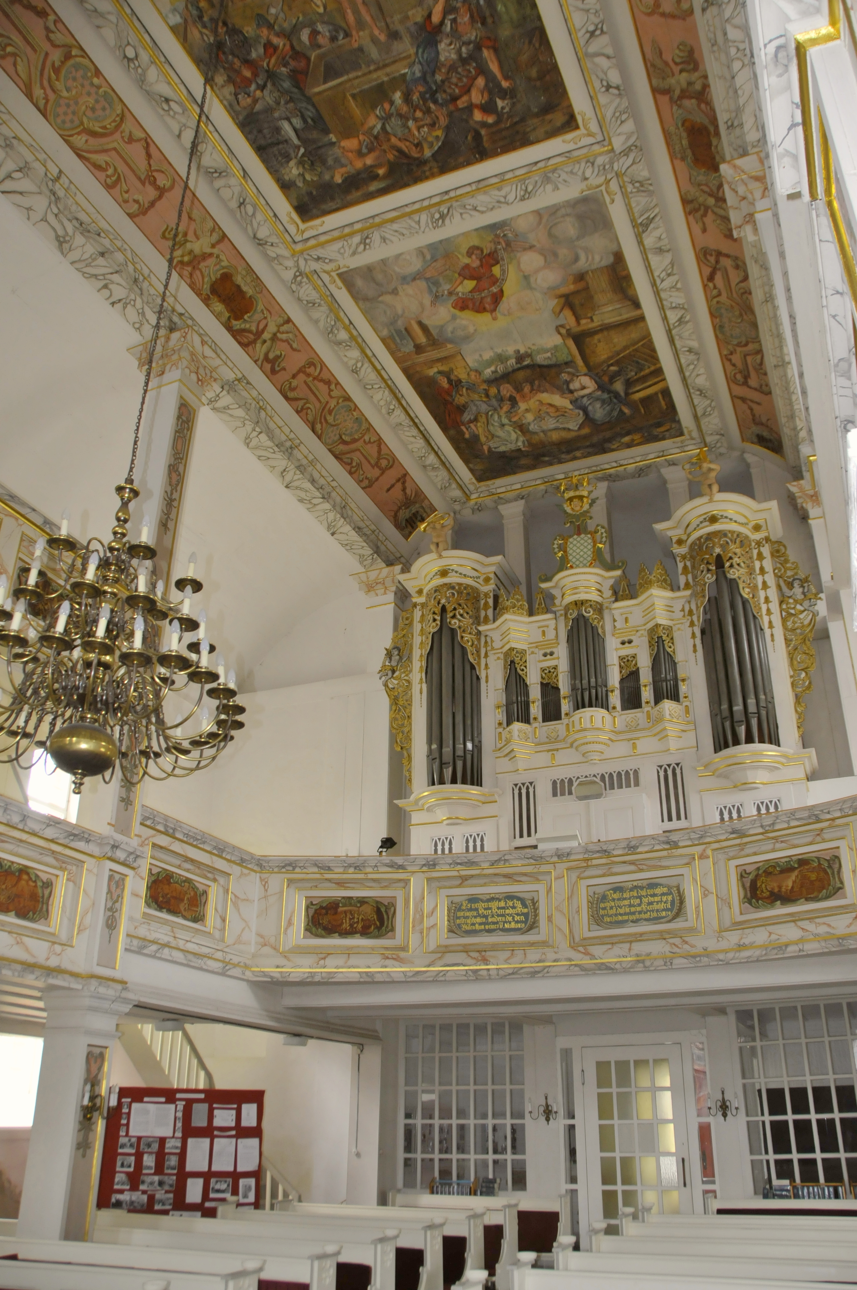 Finsterbergen, Kirche, Orgel